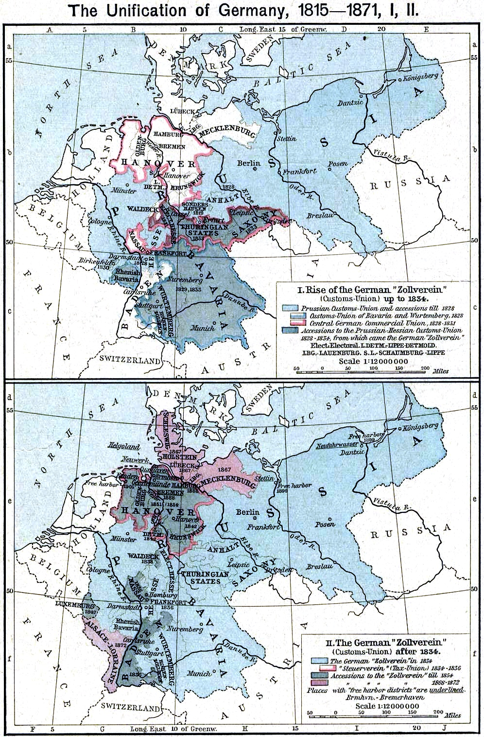 German Zollverein